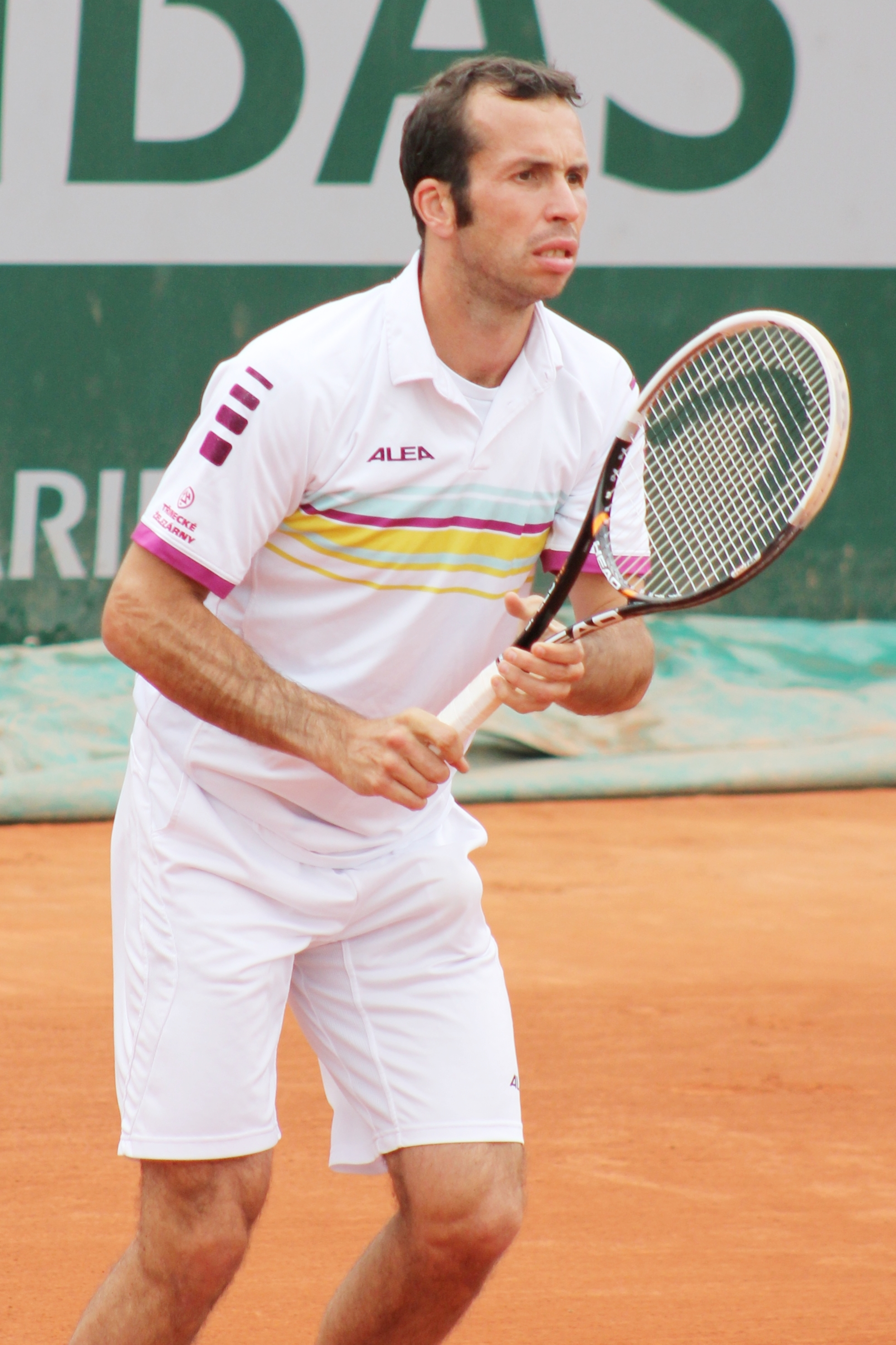 Stepanek RG13 (7)